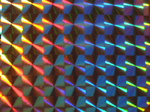 Rakennevärit eivät ole väriaineita (CMYK) eivätkä valovärejä (RGB)